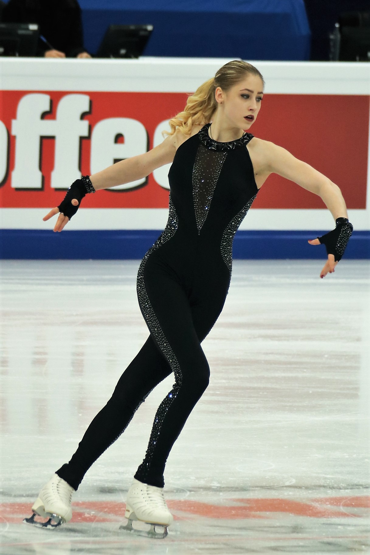 Диана Никитина (Латвия) на Чемпионате Европы по фигурному катанию 2018